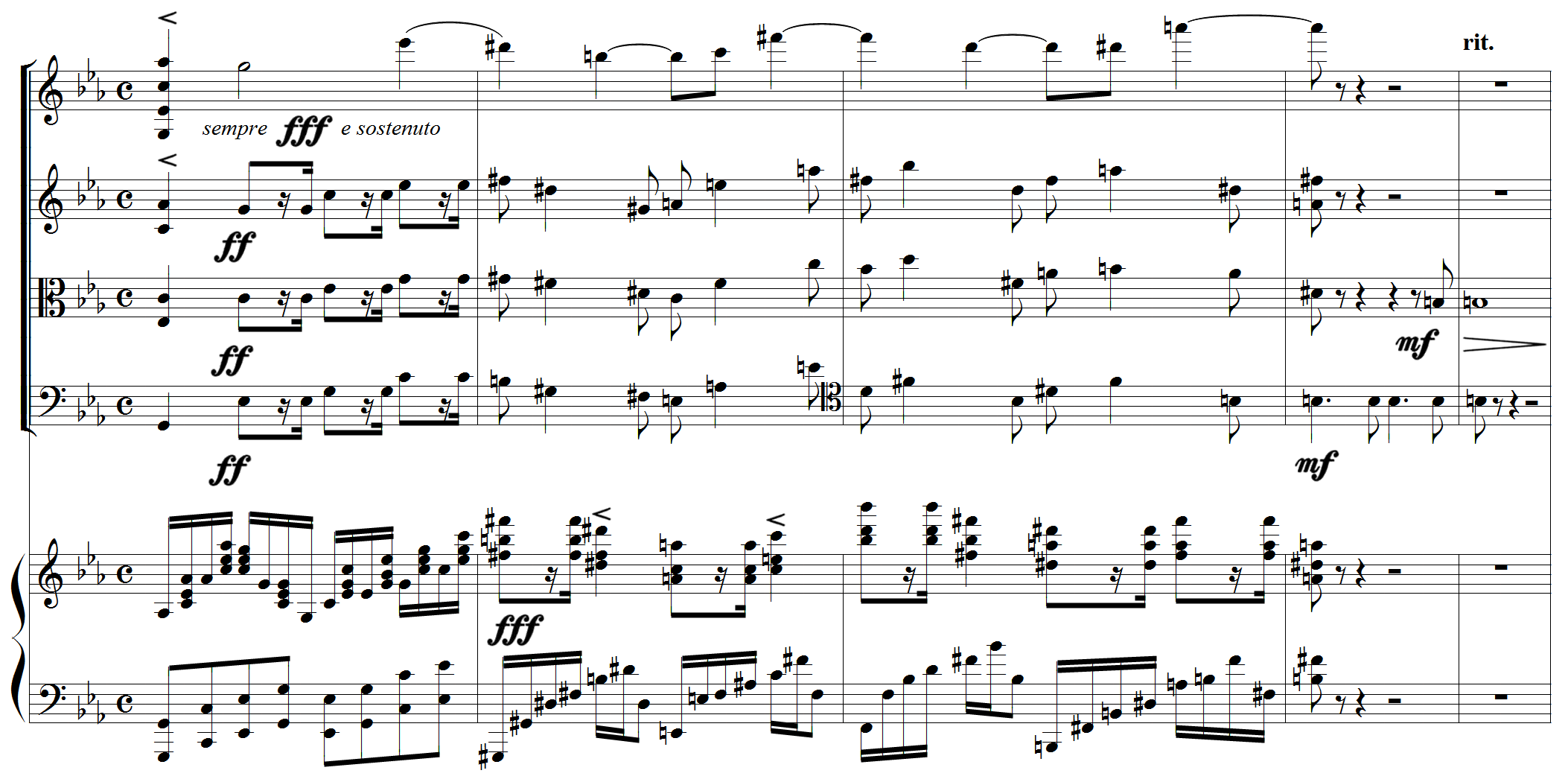 Quintette pour piano et cordes op.42 Climax du 1er mouvement